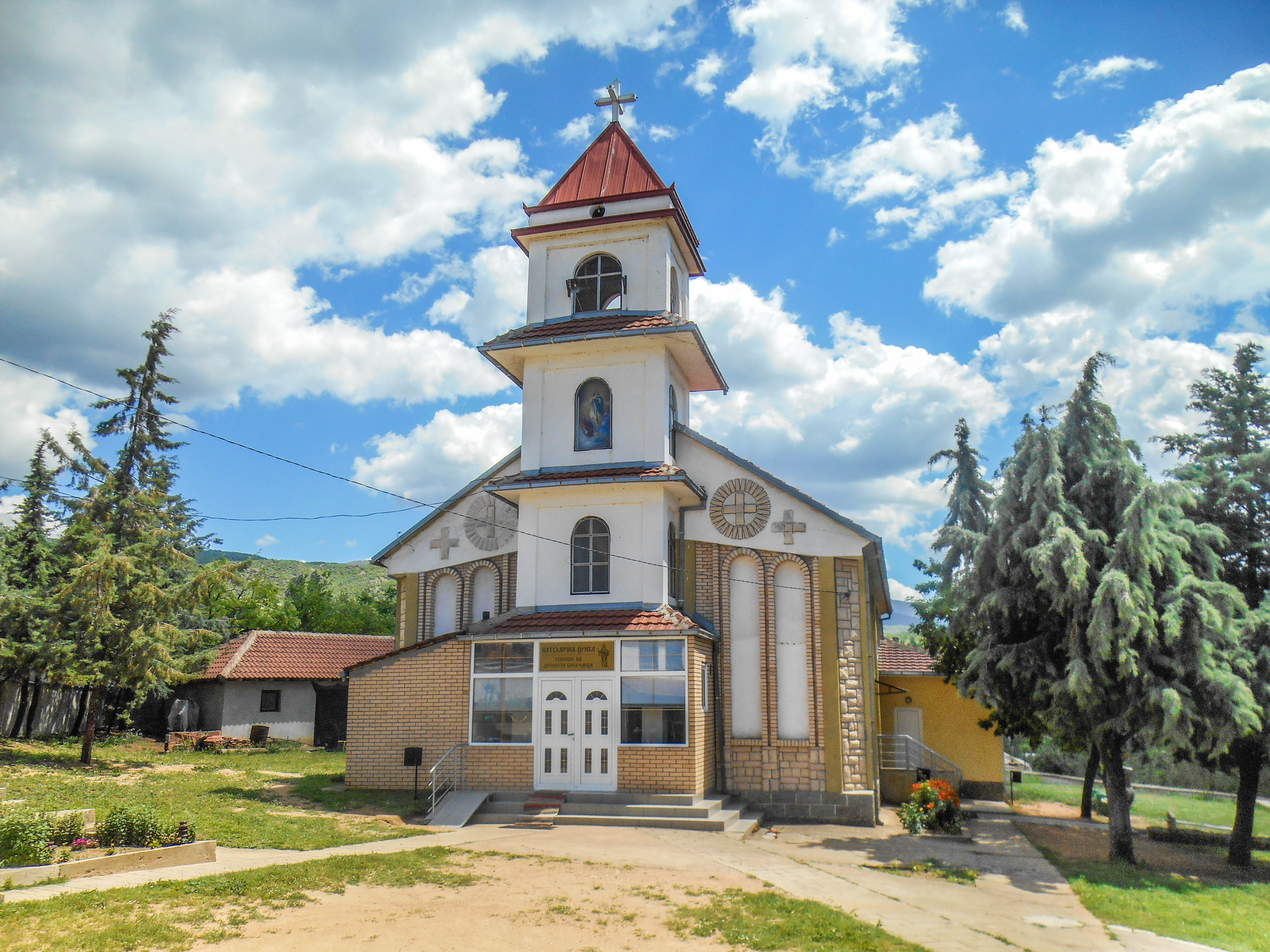 Црква „Успение на Пресавета Богородица“ - Нова Маала